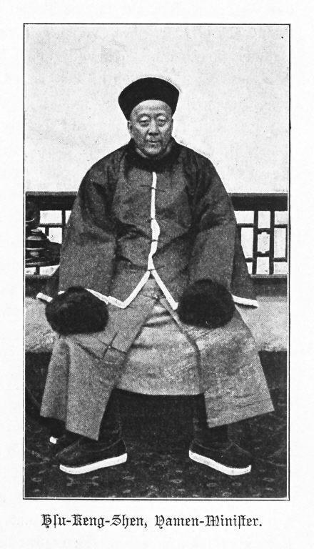 中文（中国大陆）: 许庚身肖像